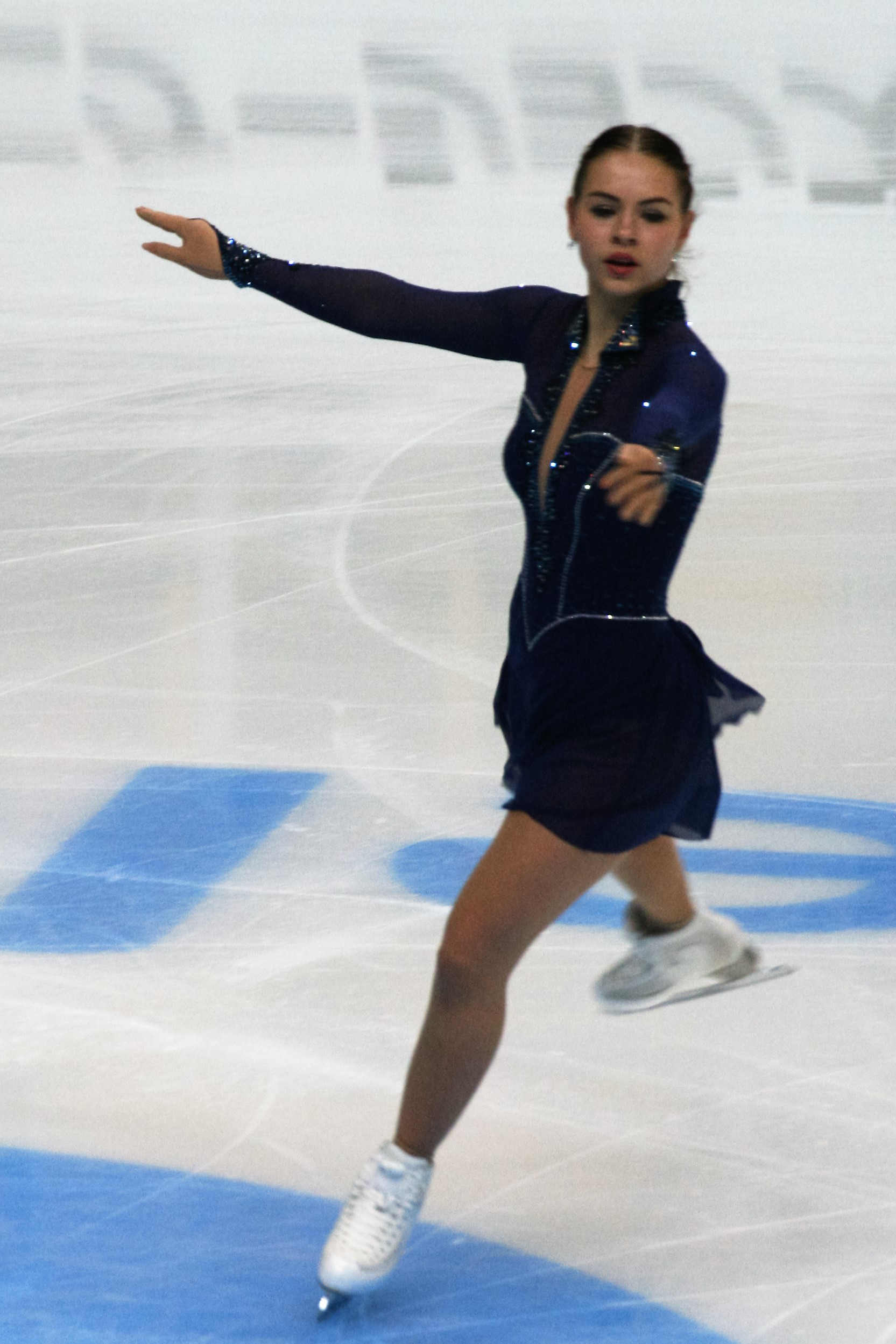 Ангелина Кучвальская (Латвия) на Кубке Ростелекома 2016.